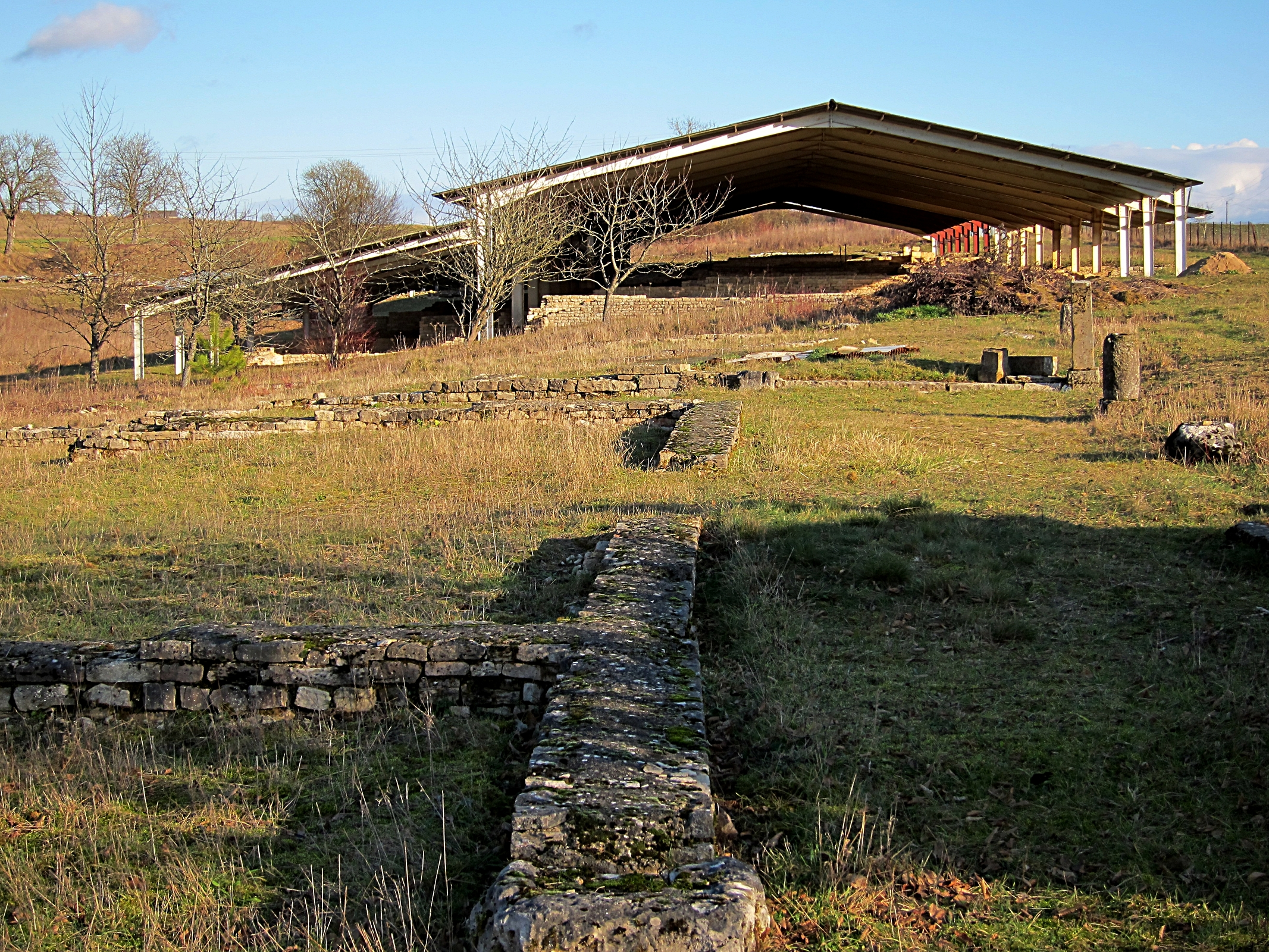 Le site gallo-romain de Mediolanum (site de La Boussière) à Mâlain (Côte-d'Or).